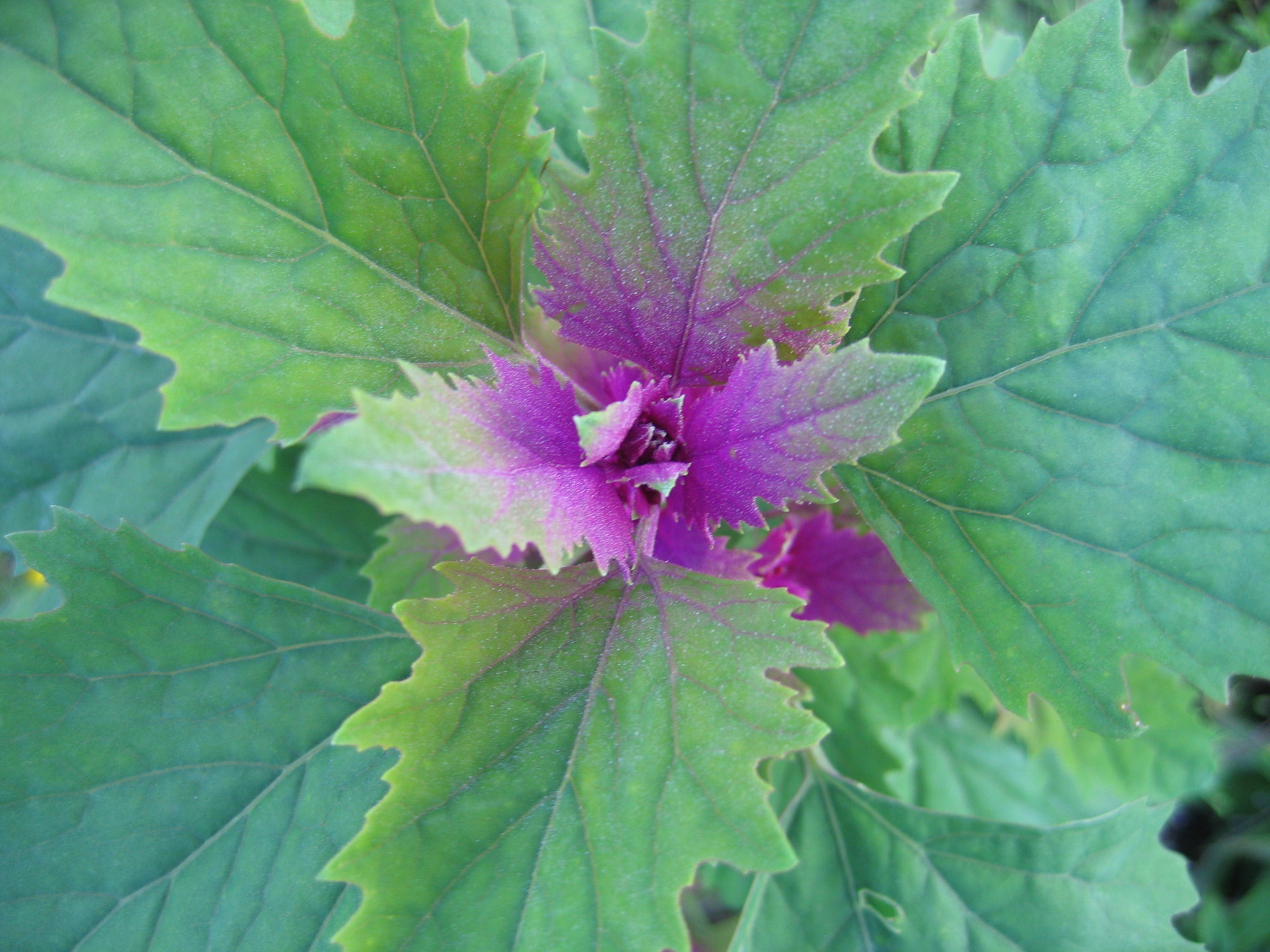 Essbare Gartenmelde (Atriplex sp.) probably not Atriplex hortensis--Thiotrix (talk) 09:45, 4 January 2012 (UTC)